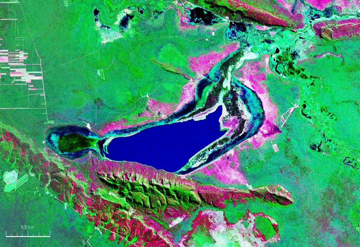 Vista satelital de la laguna Concepción ubicada en el centro del departamento de Santa Cruz (Bolivia).